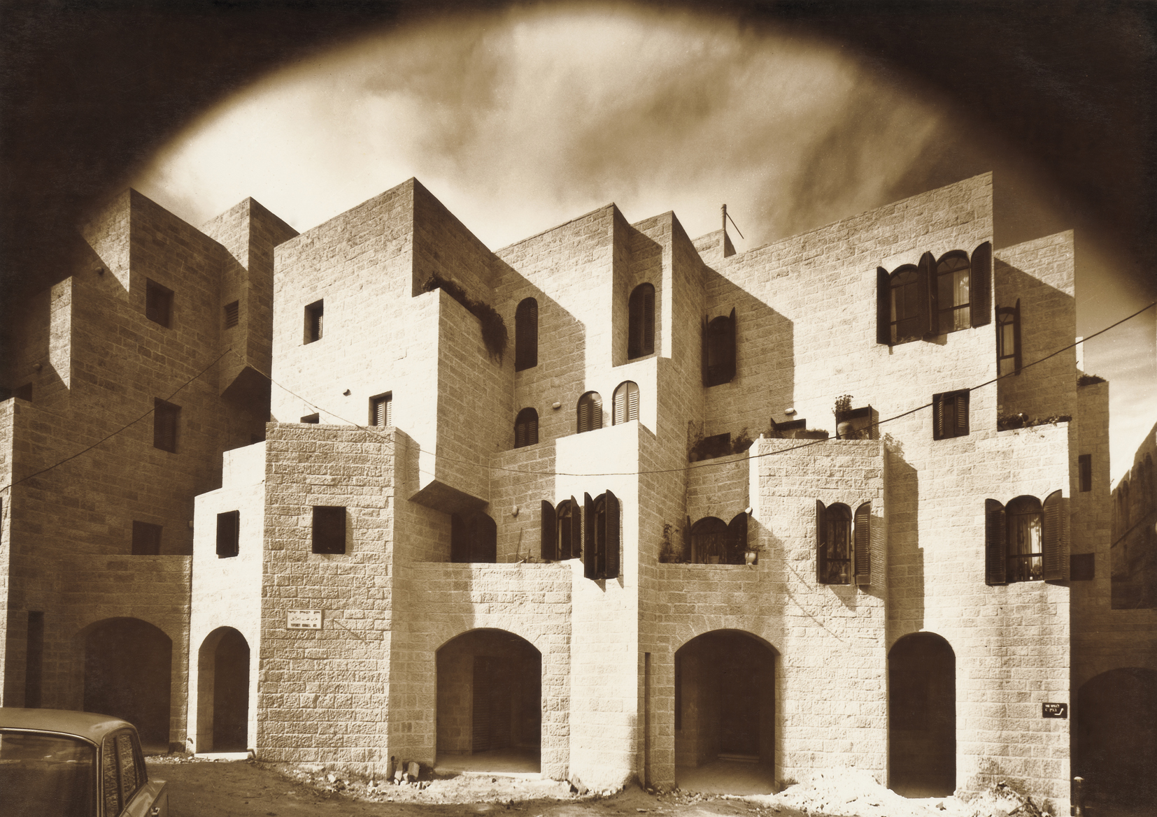 מבנן מגורים ברובע היהודי בעיר העתיקה, ירושלים